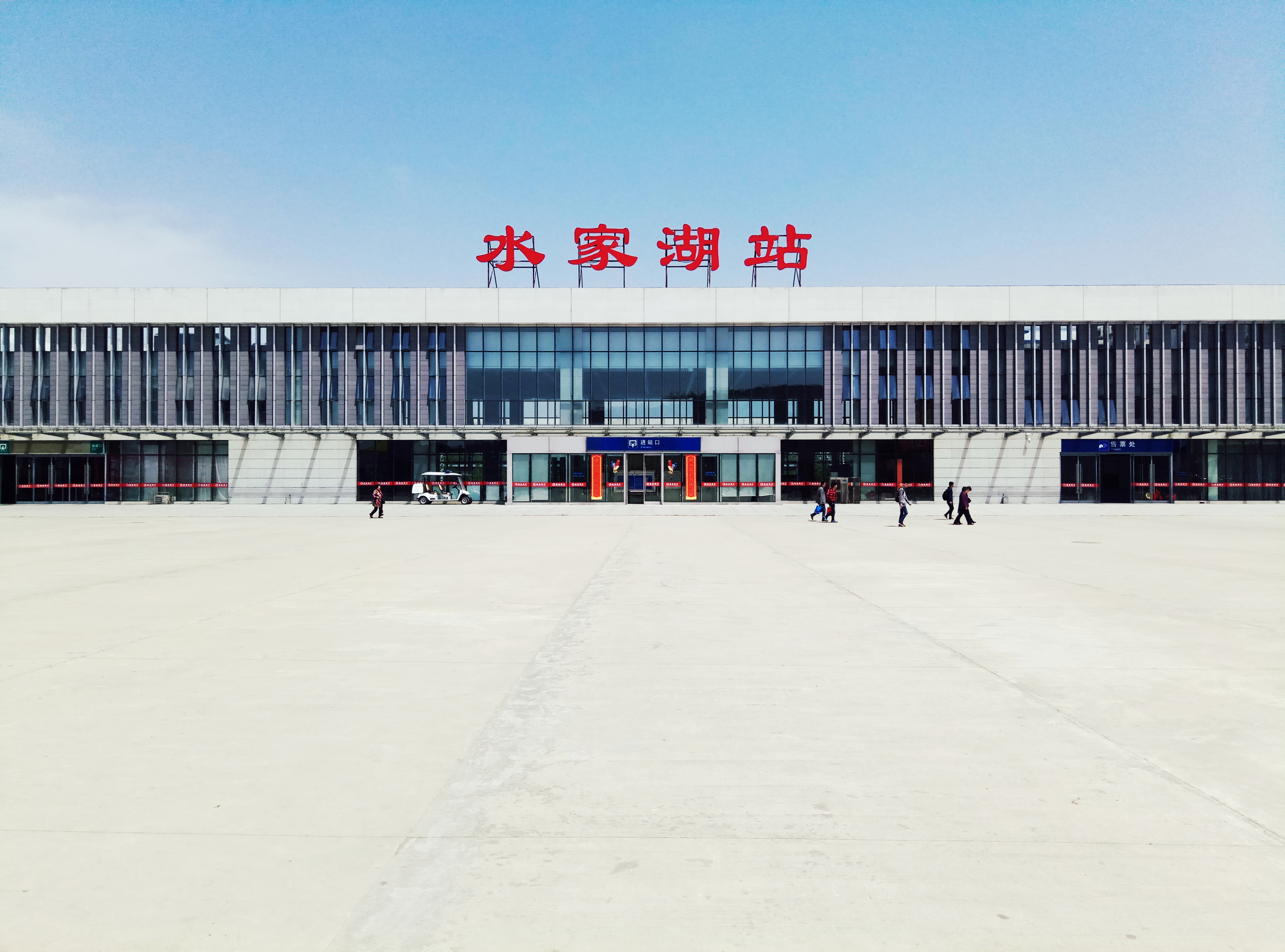 水家湖站站房